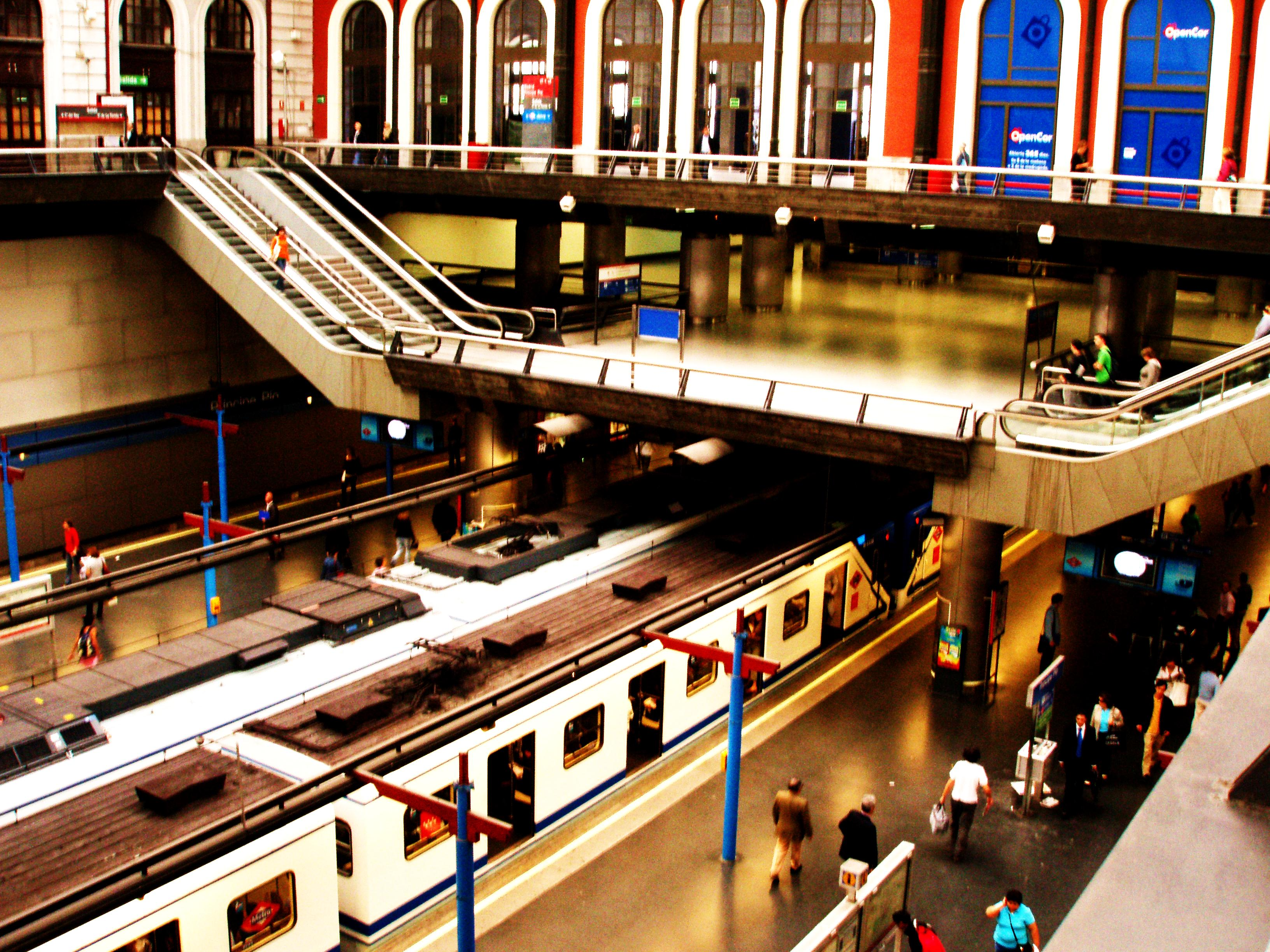 Acceso sur al metro y vista de los andenes de las líneas 6 y 10 en la estación madrileña de Príncipe Pío.